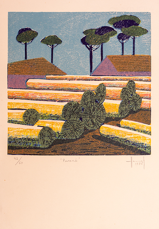 Xilogravura pro Hannah Brandt